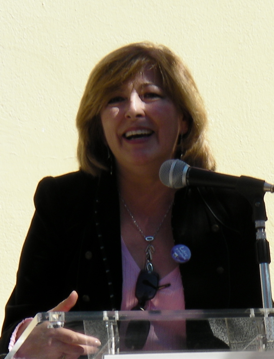 La política española Concha Caballero